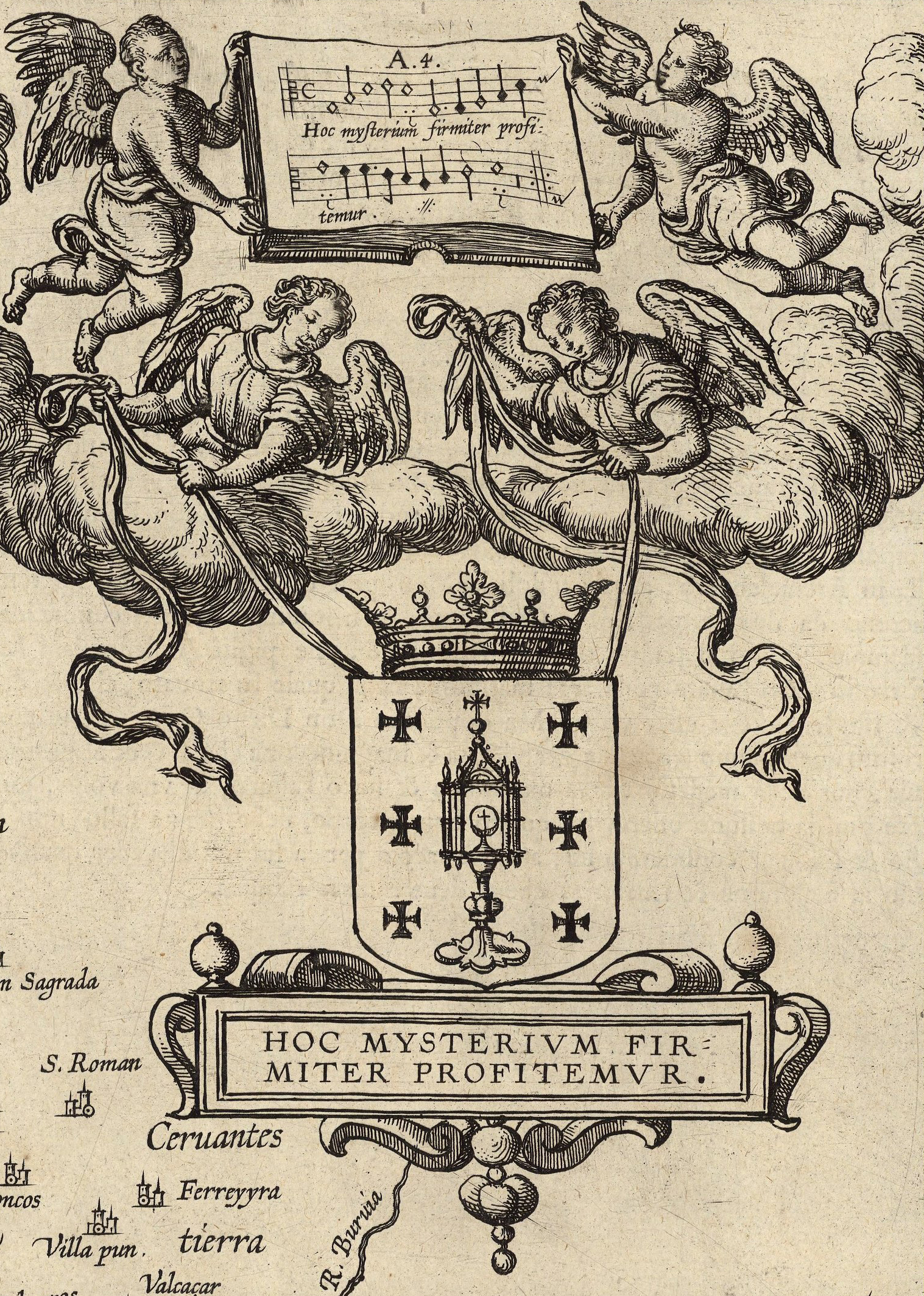 Escudo de Galiza no mapa Descripcion del Reyno de Galizia de Fernando Ojea publicado na edición de 1603 do atlas Theatrum Orbis Terrarum de Abraham Ortelius.